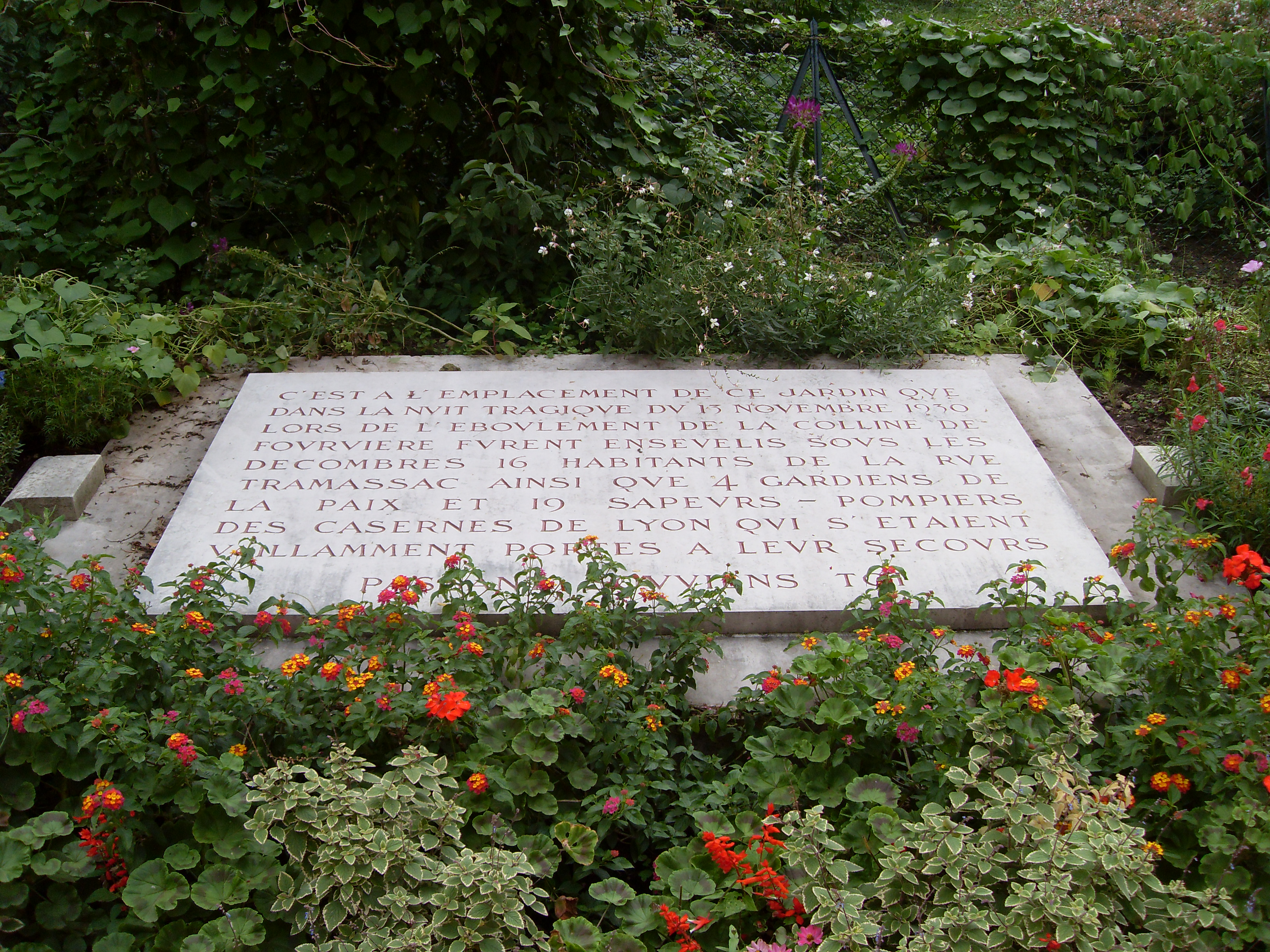 Plaque commémorative de la catastrophe de Fourvière à Lyon. Il est écrit: «C'est à l'emplacement de ce jardin que dans la nuit tragique du 13 novembre 1930 lors de l'éboullement de la colline de Fourvière furent ensevelis sous les décombres 16 habitants de la rue Tramassac ainsi que 4 gardiens de la paix et 19 sapeurs-pompiers des casernes de Lyon qui s'étaient vaillament portés à leur secours. Passant, souviens toi.»